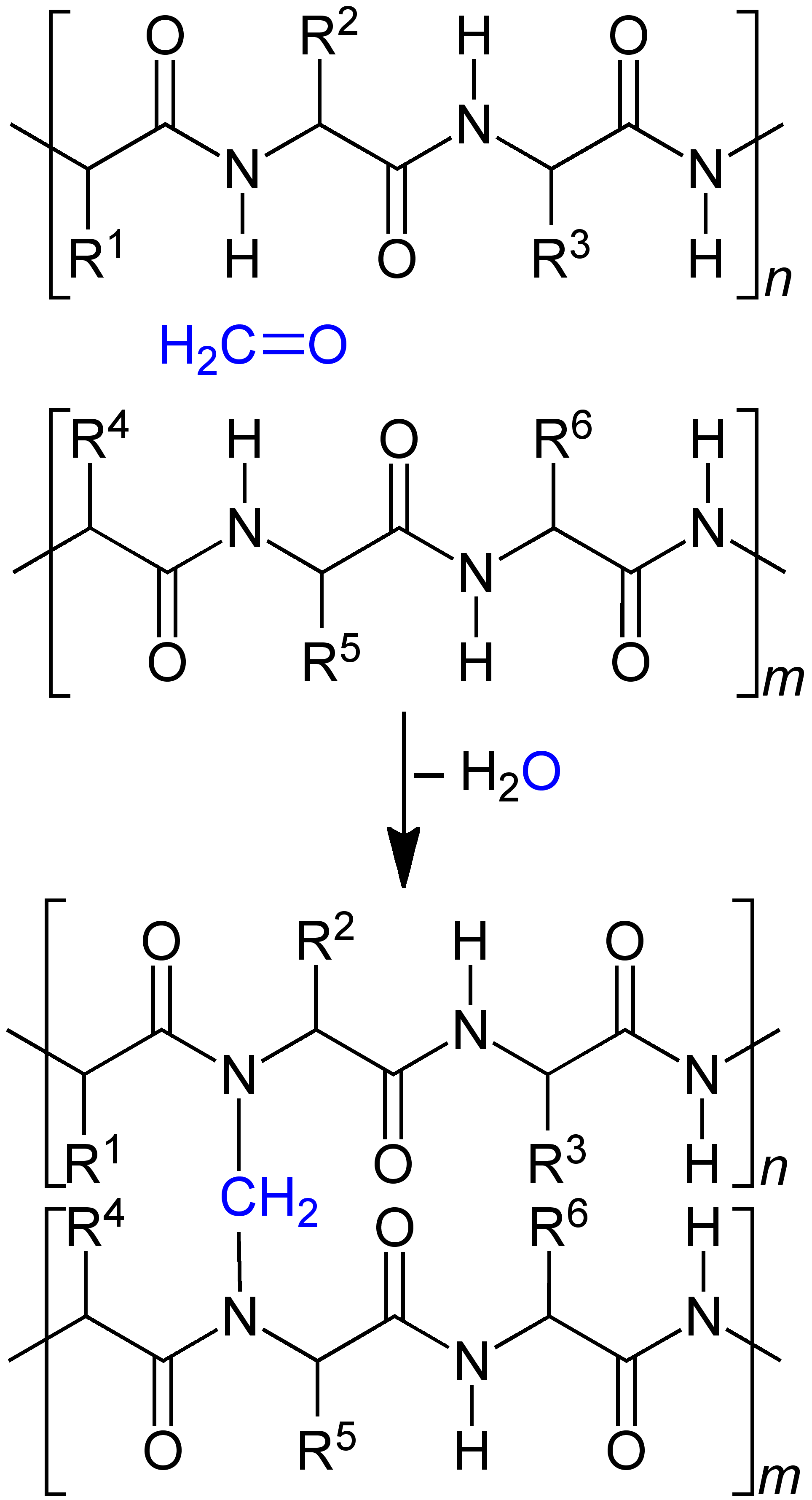 Vernetzung von zwei Proteinketten über eine Methylengruppe durch chemische Reaktion mit Formaldehyd – Herstellung von Kunsthorn.Karlheinz Biederbick: Kunststoffe, Vogel-Verlag, 4. Auflage, 1977, S. 172, ISBN 3-8023-0010-6.